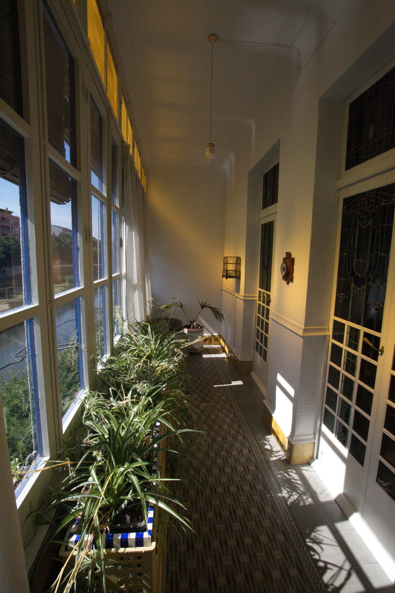 Casa Masó (Girona)